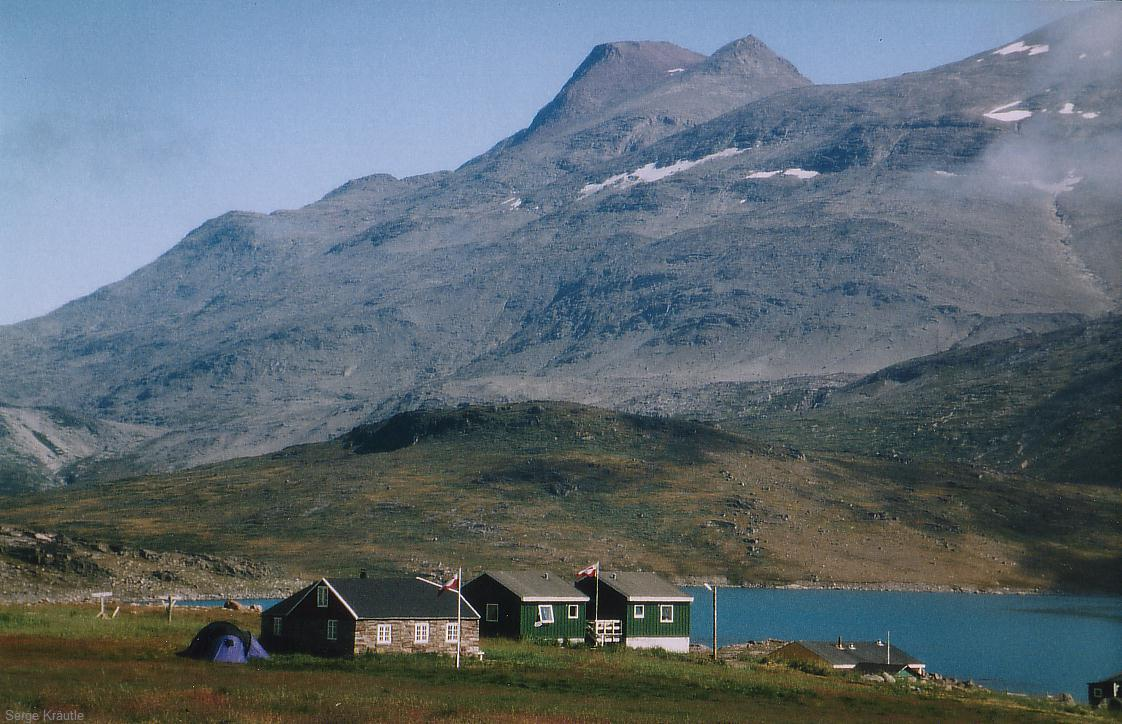 Der Berg Illerfissalik, gesehen von Igaliku